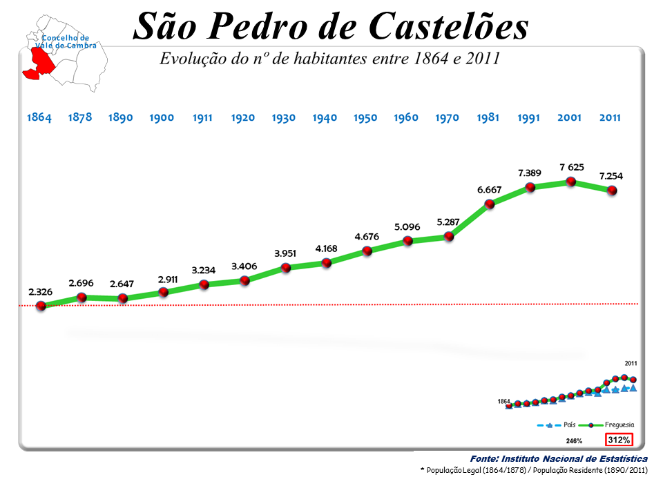 Evolução demográfica do concelho de Vale de Cambra